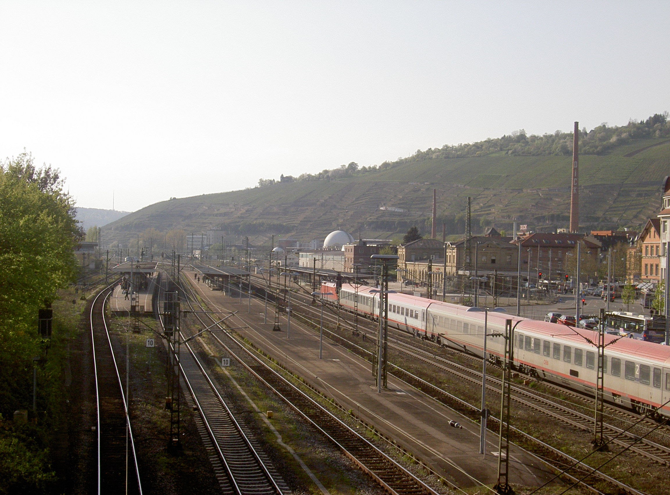 Bahnhof Esslingen (Neckar)